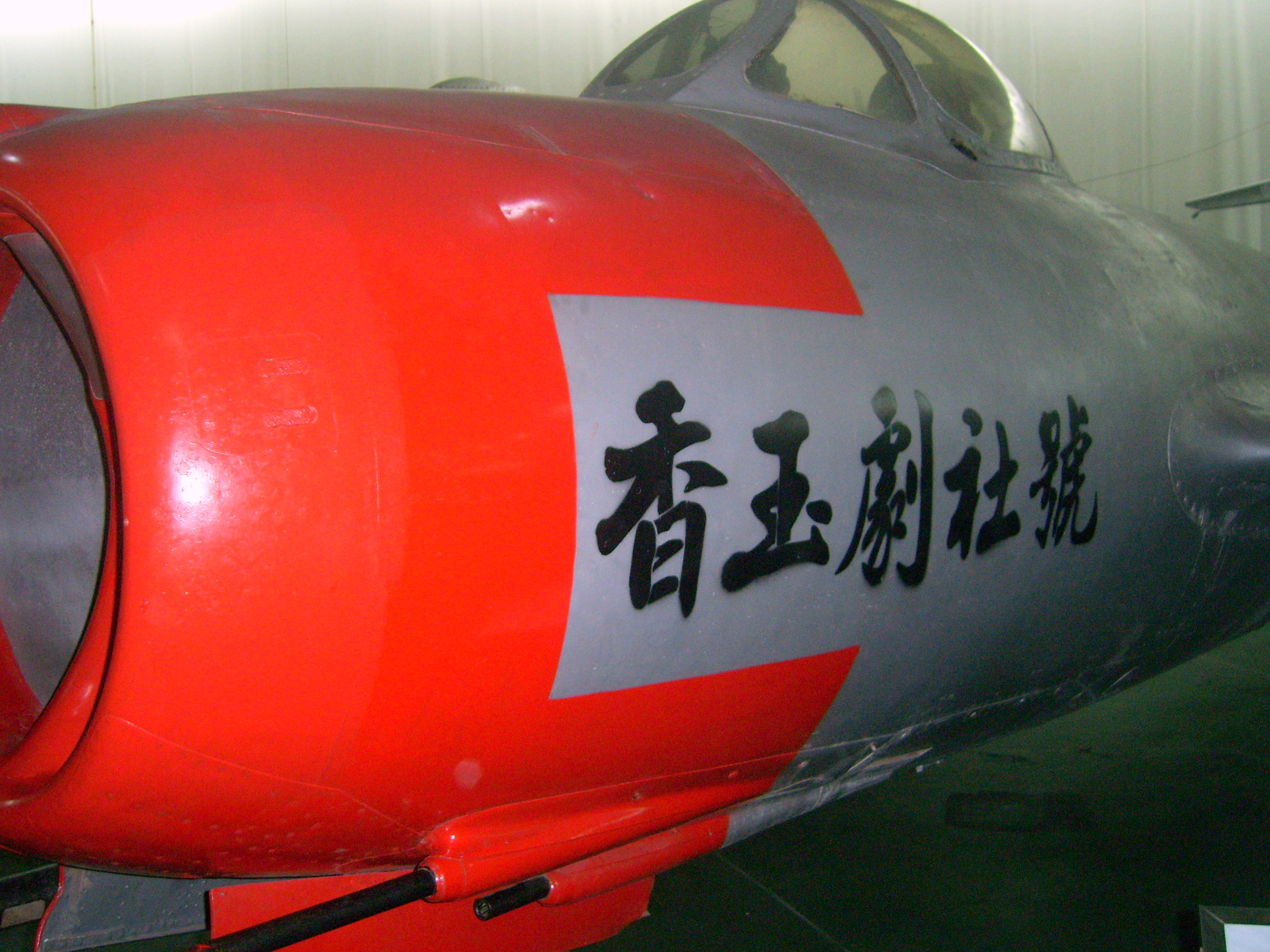 香玉剧社号飞机，于北京航空博物馆。